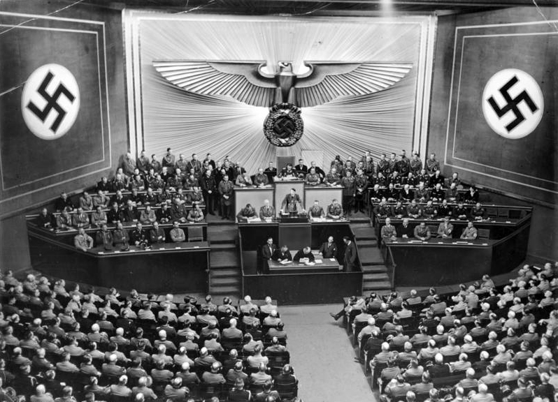 Scherl: Die historische Reichstagssitzung am 19. Juli 1941, Blick in das Plenum während der großen Rede des Führers. Foto: Schw[ahn] 6083-40